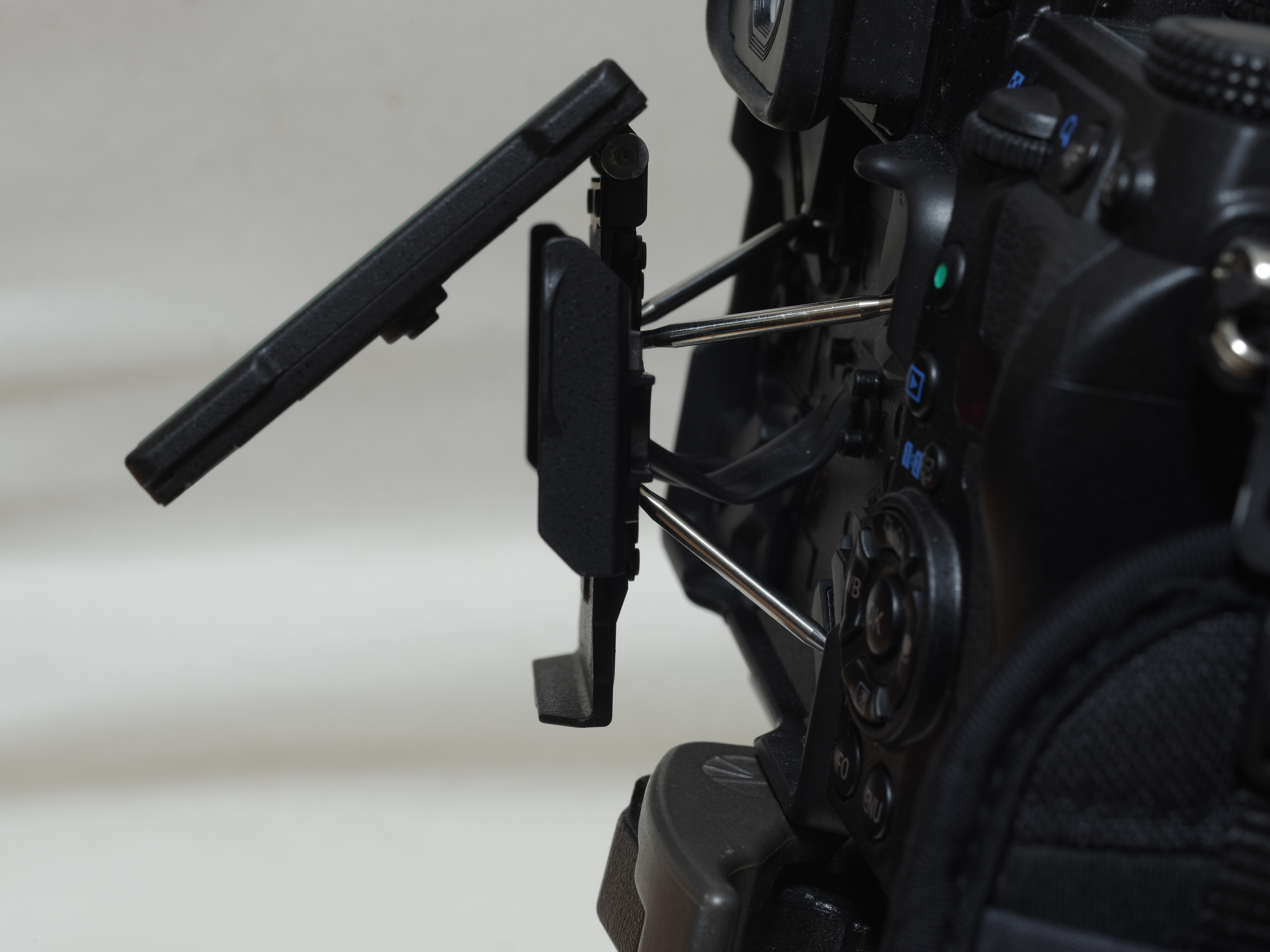 Pentax K-1 mkII LCD